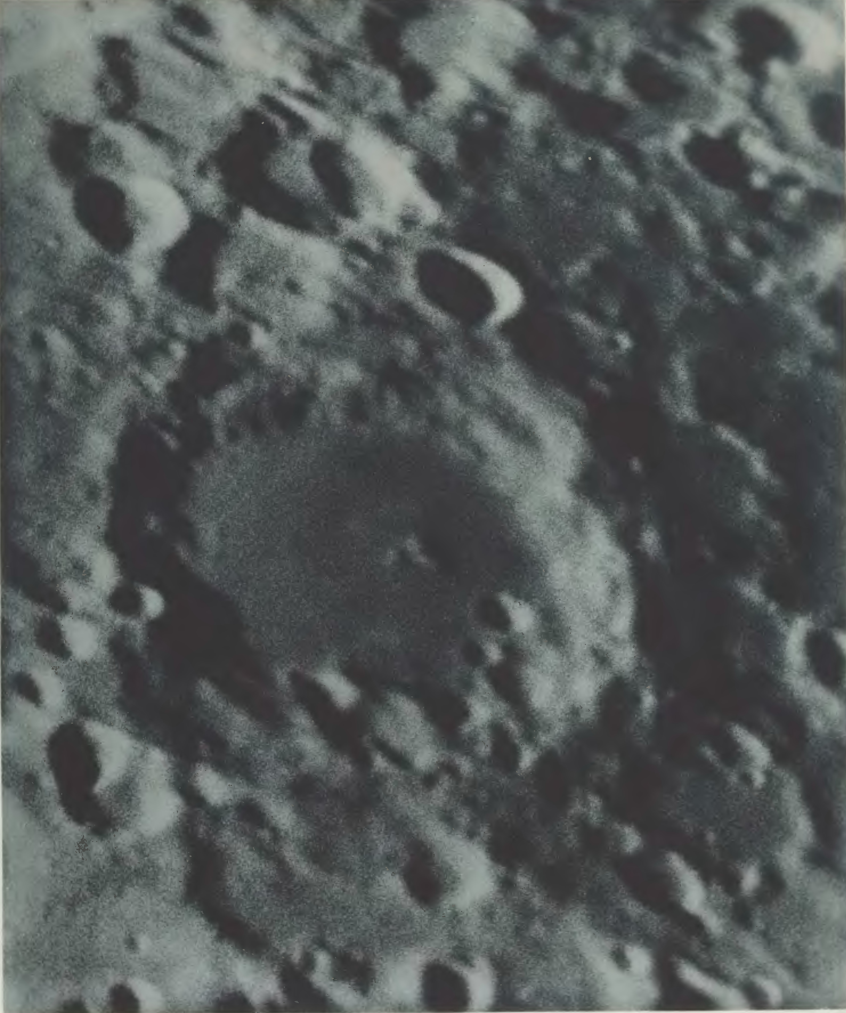 Photographischer Mond-Atlas vornehmlich auf Grund von focalen Negativen der Lick-Sternwarte im Massstabe eines Monddurchmessers von 10 Fuss ausgeführt von Professor Ladislaus Weinek. Heft V. Tafel 97